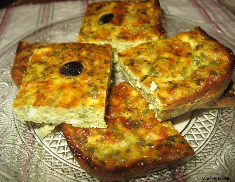 tajine tunisien